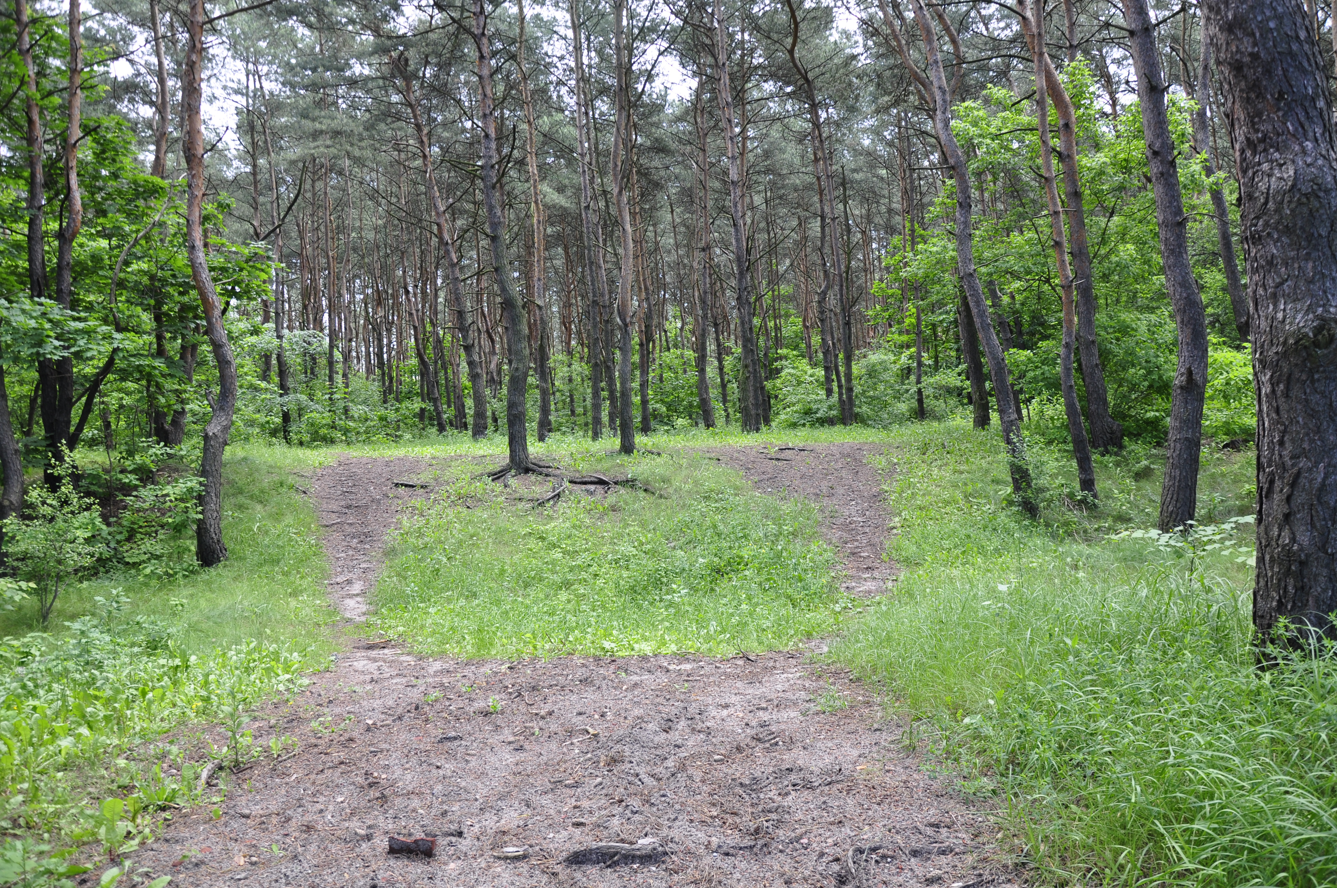 Warschau Wawer, Fort 19.Jhd, heute Park, noch verbliebene Bodenwellen